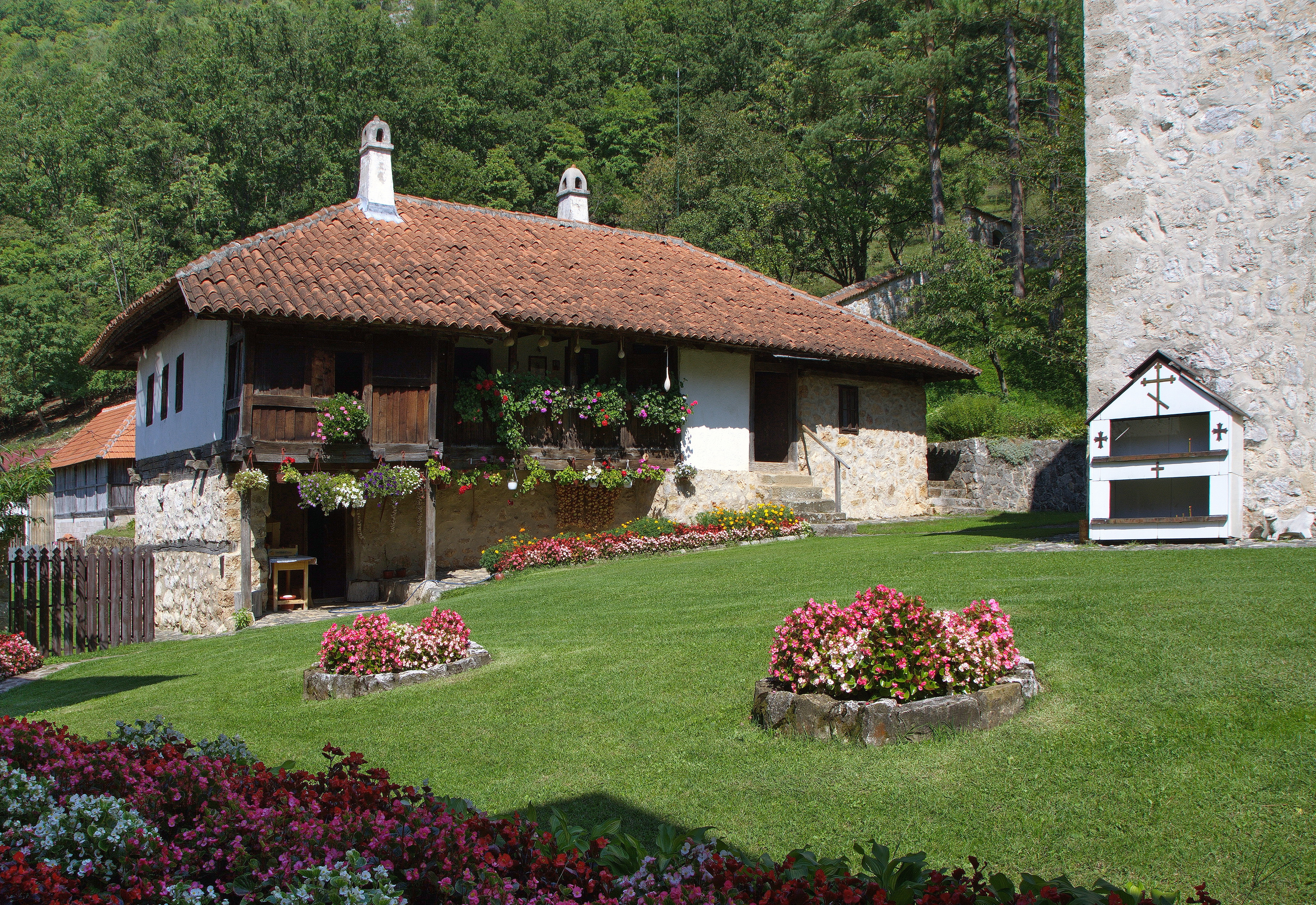 Манастир Свете Тројице је мушки.